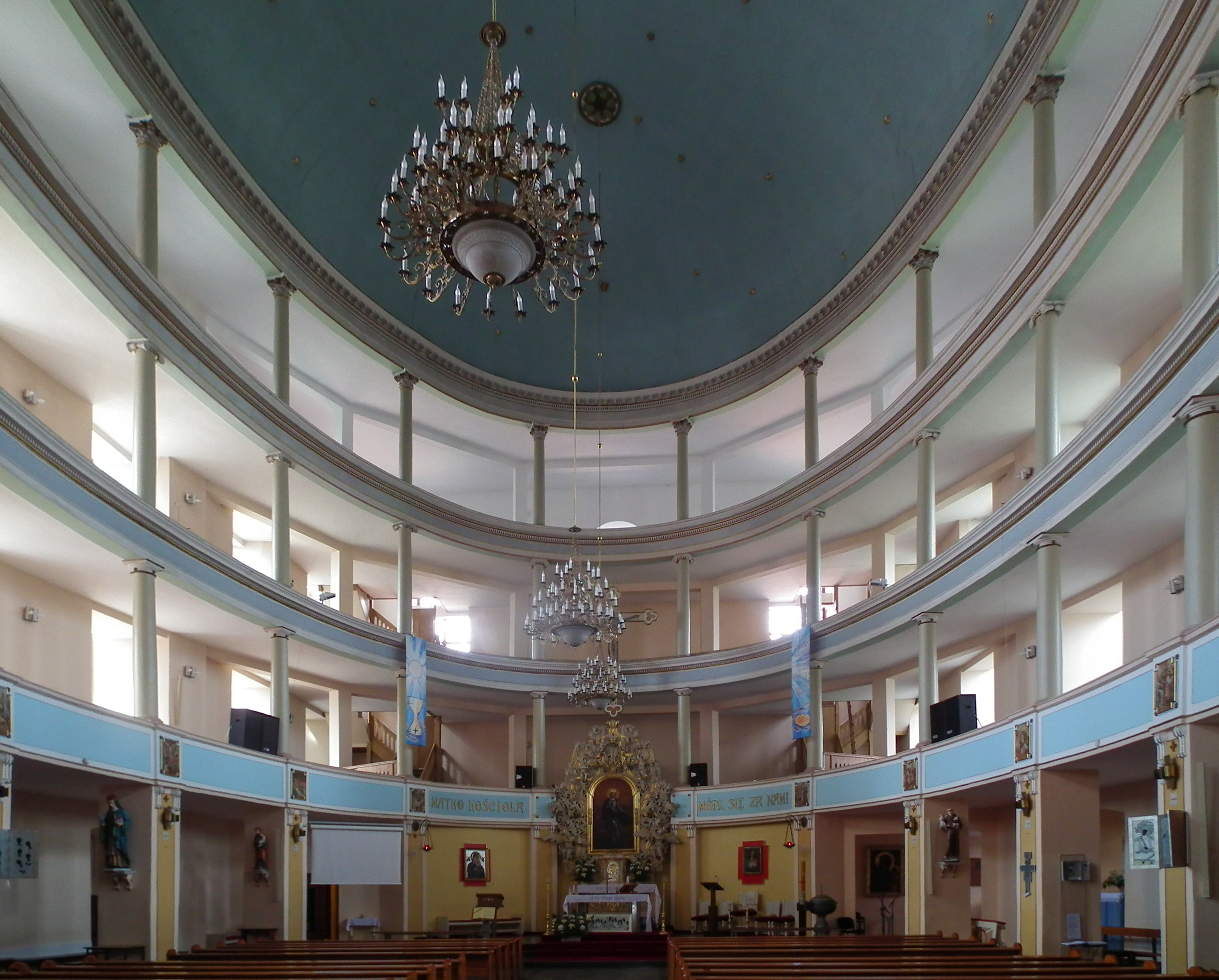 Kościół Maryi Królowej w Dzierżoniowie.